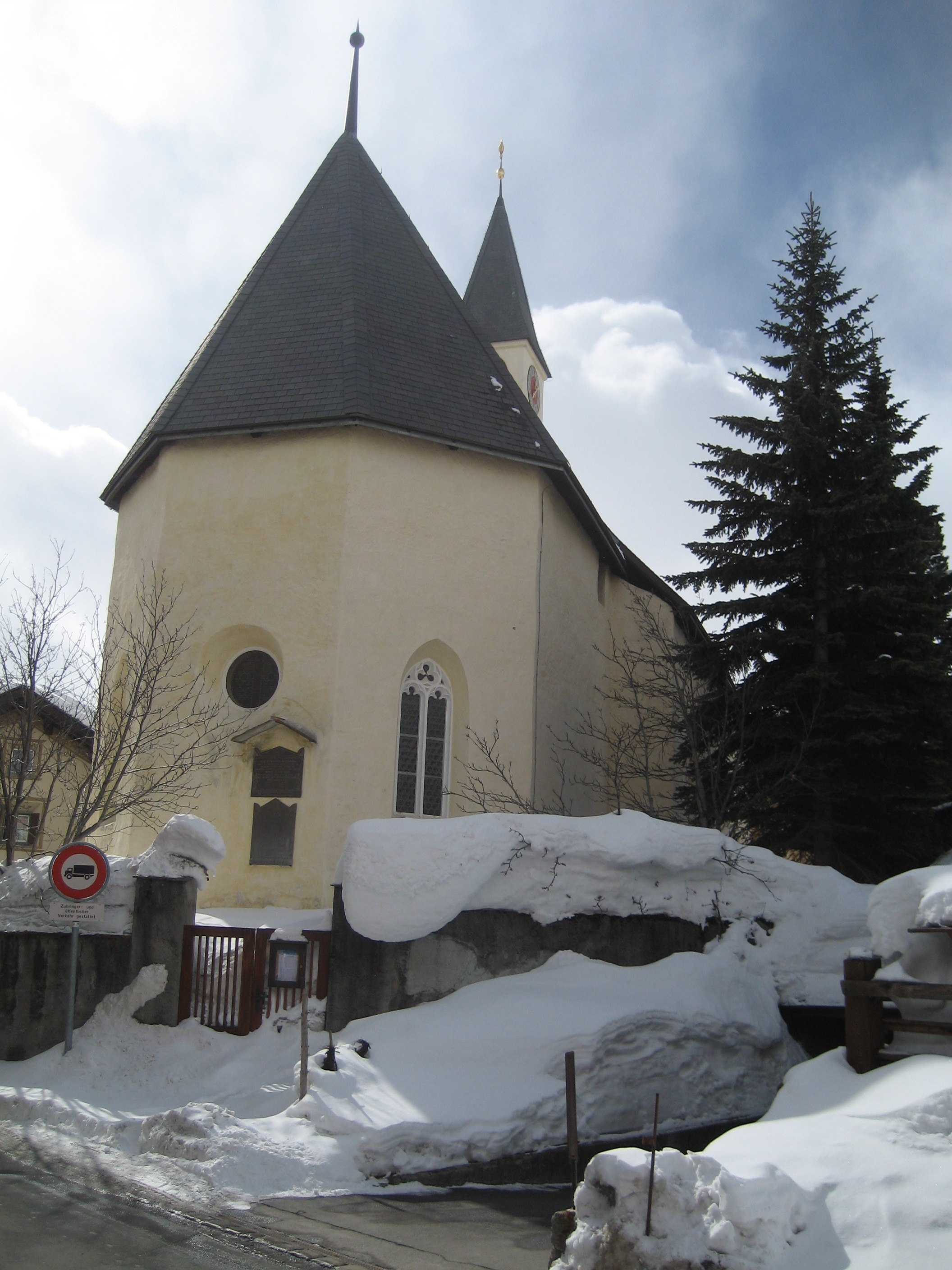 Village church in Silvaplana, Switzerland